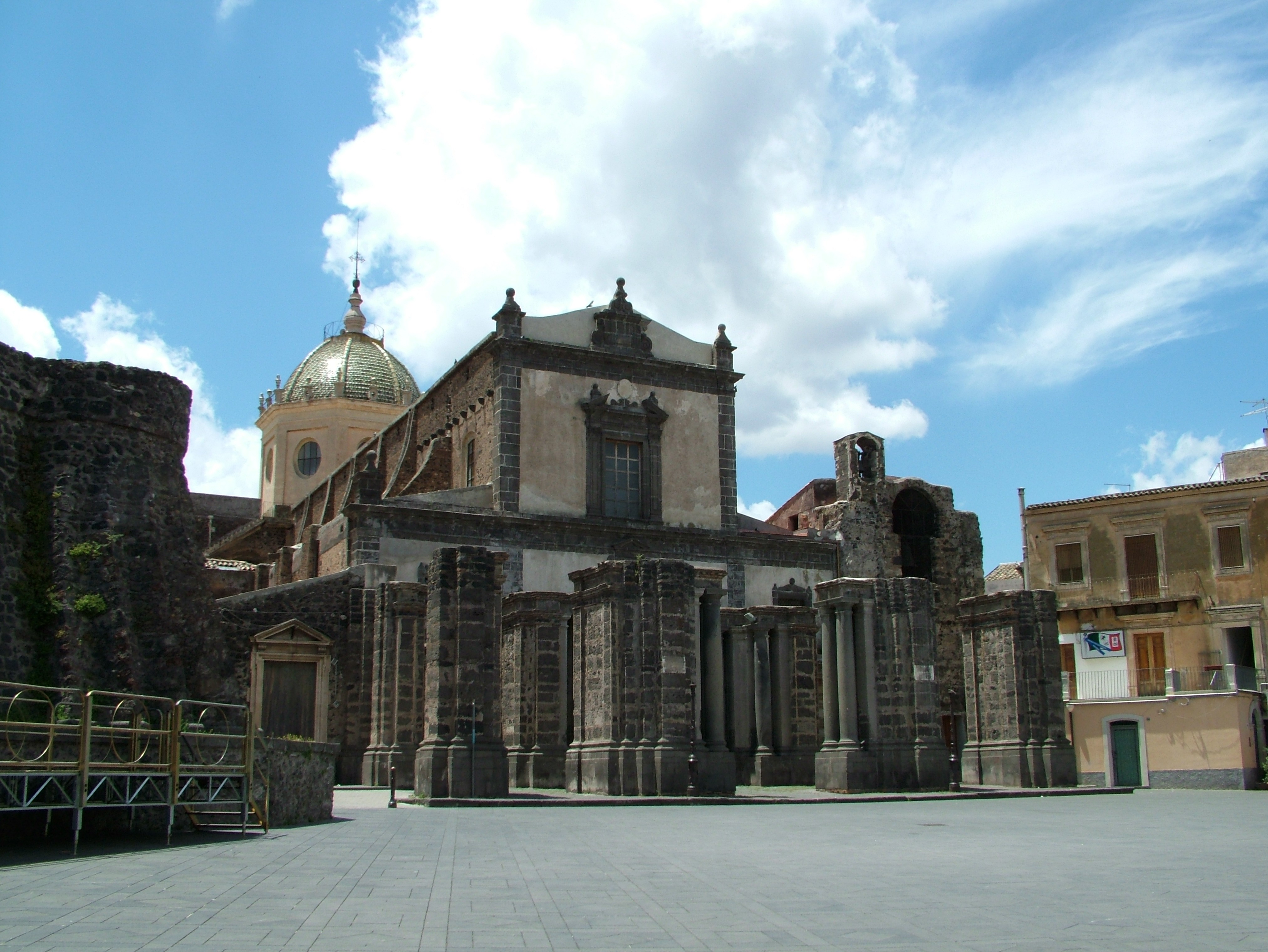 Adrano, Sizilien, Chiesa Madre